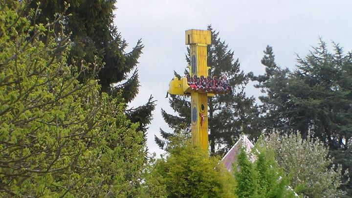 Sky Tower